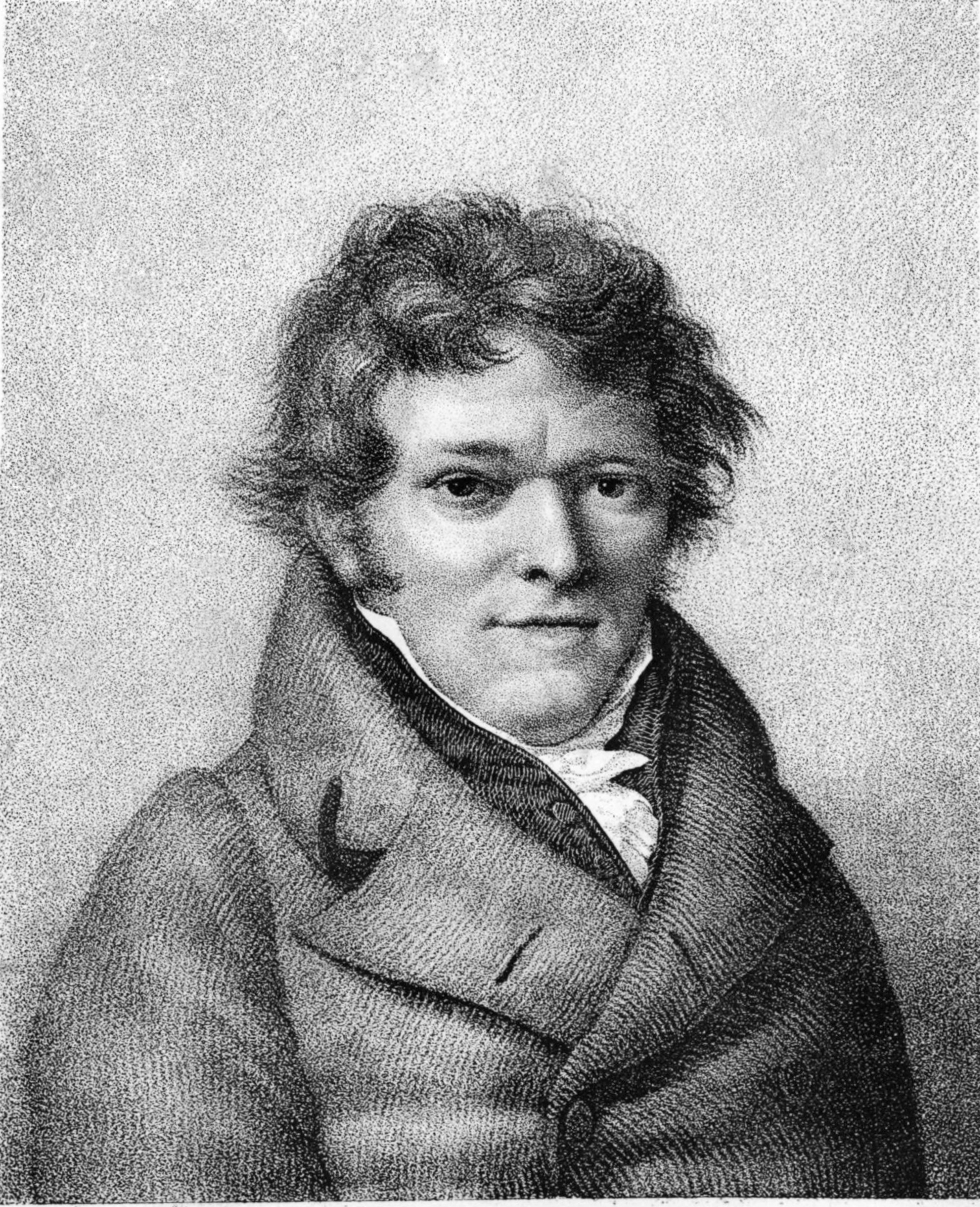 Portrait Alois Senefelder. Alois Senefelder: L' art de la lithographie, ou instruction pratique contenant la description claire et succincte des différens procédés a suivre pour dessiner, graver et imprimer sur pierre; précédée d' une histoire de la lithographie et de ses divers progrès.